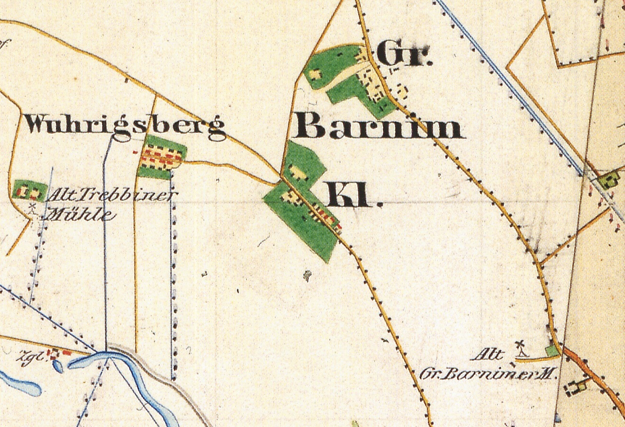 Altbarnin (Großbarnim, Kleinbarnim und Wuberigsberg) auf dem Urmesstischblatt 3351 Neutrebbin von 1826